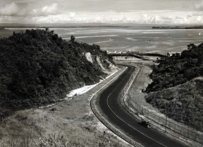 Foto. Gezicht over de Jalan Minyak en de Baai van Balikpapan